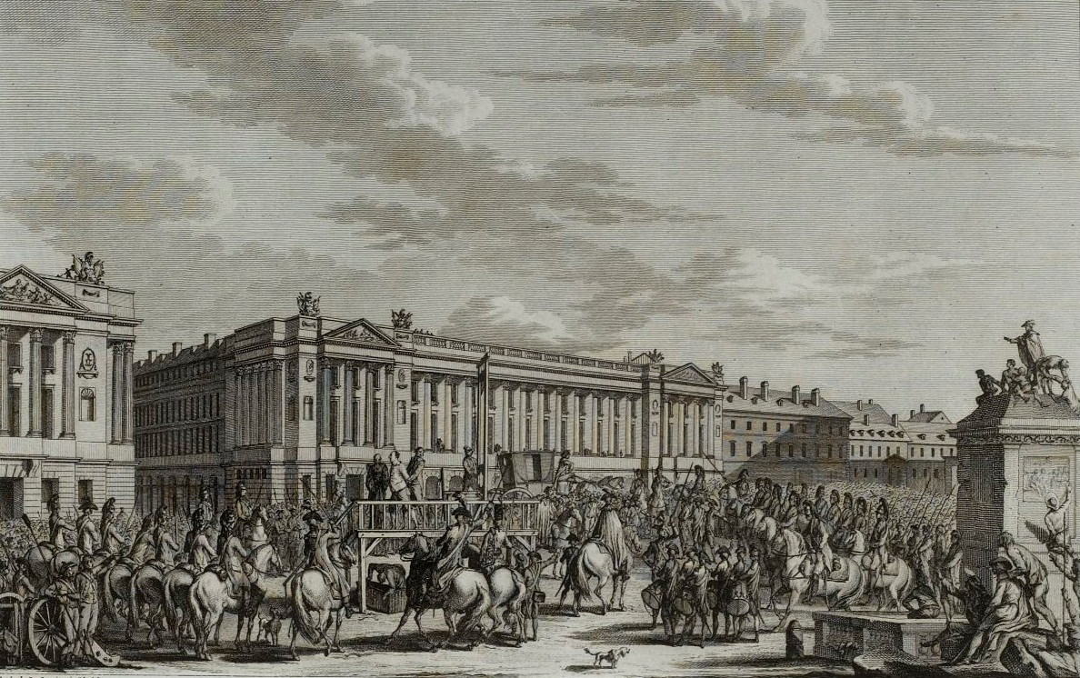 Exécution de Louis XVI le 21 janvier 1793 (musée de la Révolution française - Vizille)